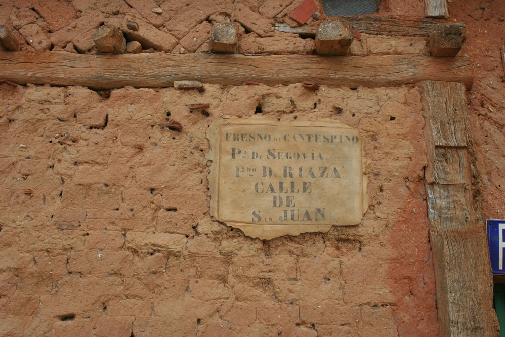 Antiguo cartel de calle de Fresno de Cantespino, Segovia, ubicado en un casa de arquitectura tradicional en adobe y madera